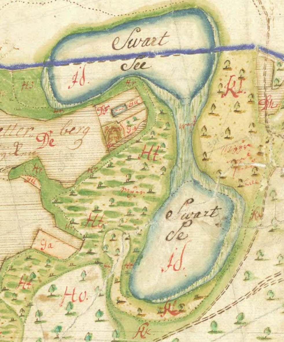 Auszug aus der Matrikelkarte von Usedom der Schwedischen Landesvermessung von Vorpommern